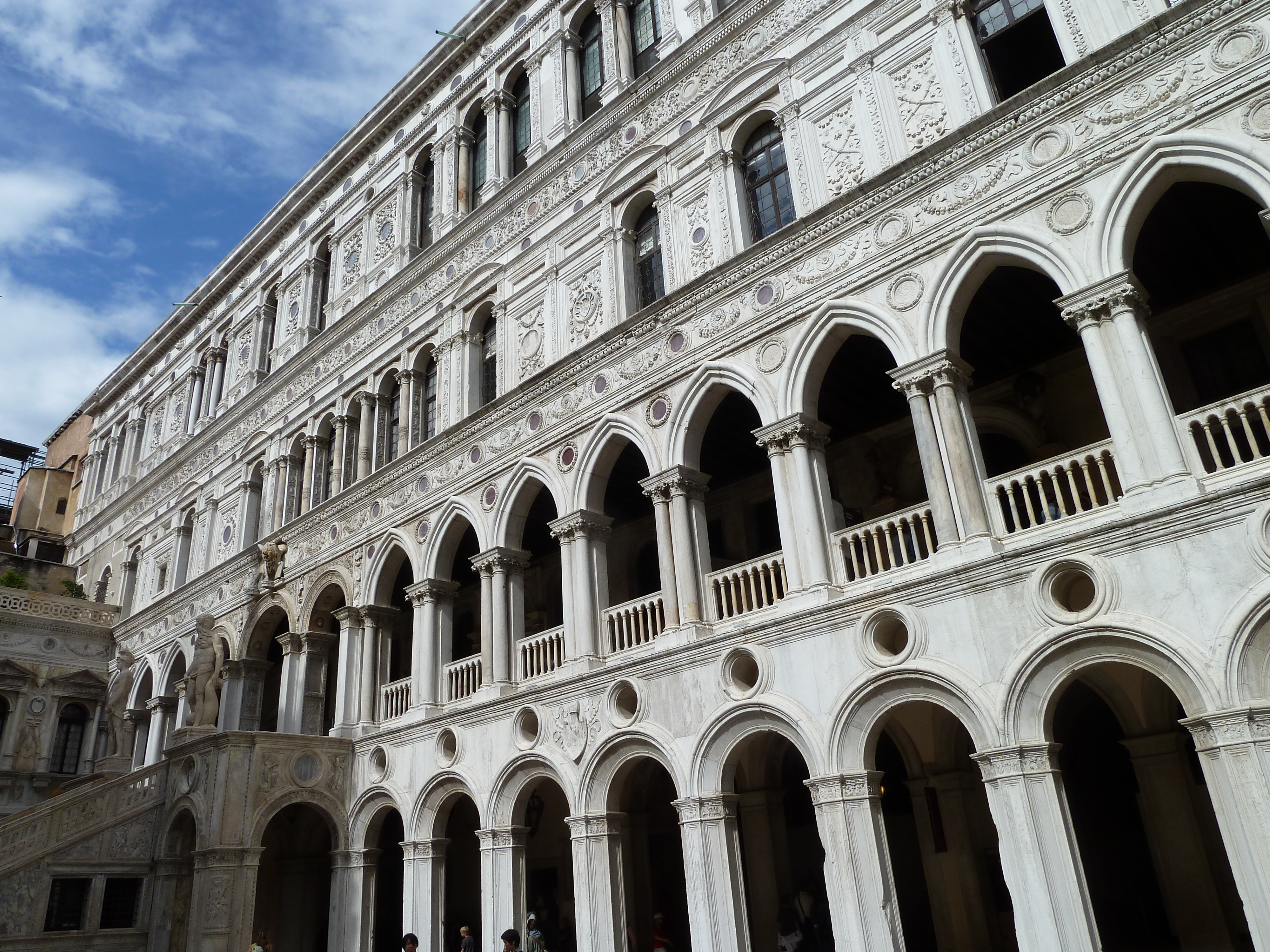 Cour du Palais des Doges